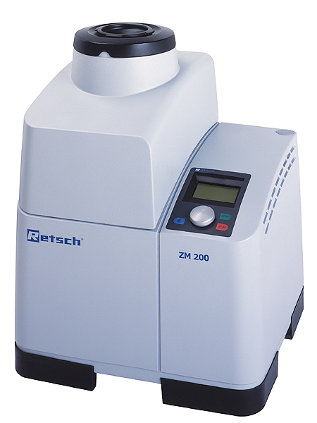 Ultra-Zentrifugalmühle Urheber: Retsch GmbH Freigabe